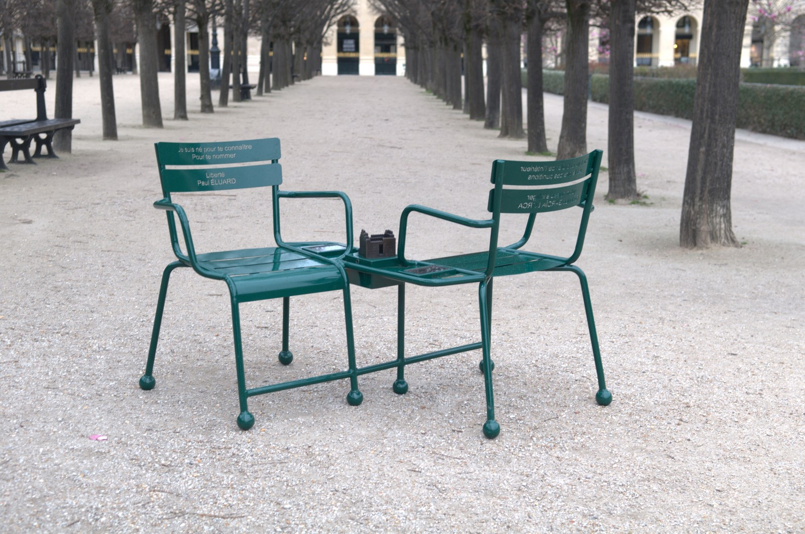 Chaise-poème du jardin du Palais-Royal